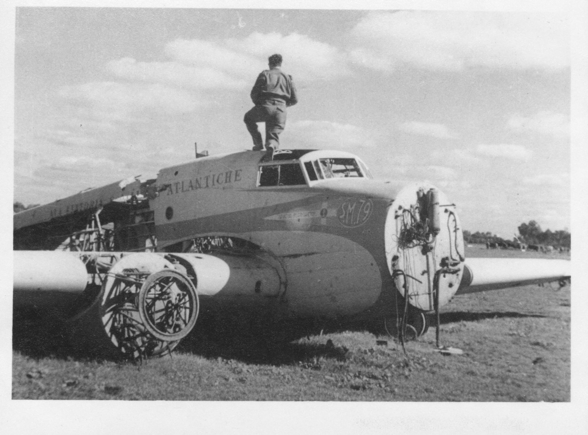 SM.79 dismesso a Bengasi 1943